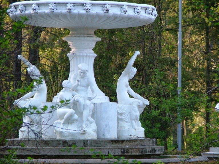 Statue from Cluj-Napoca Central Park